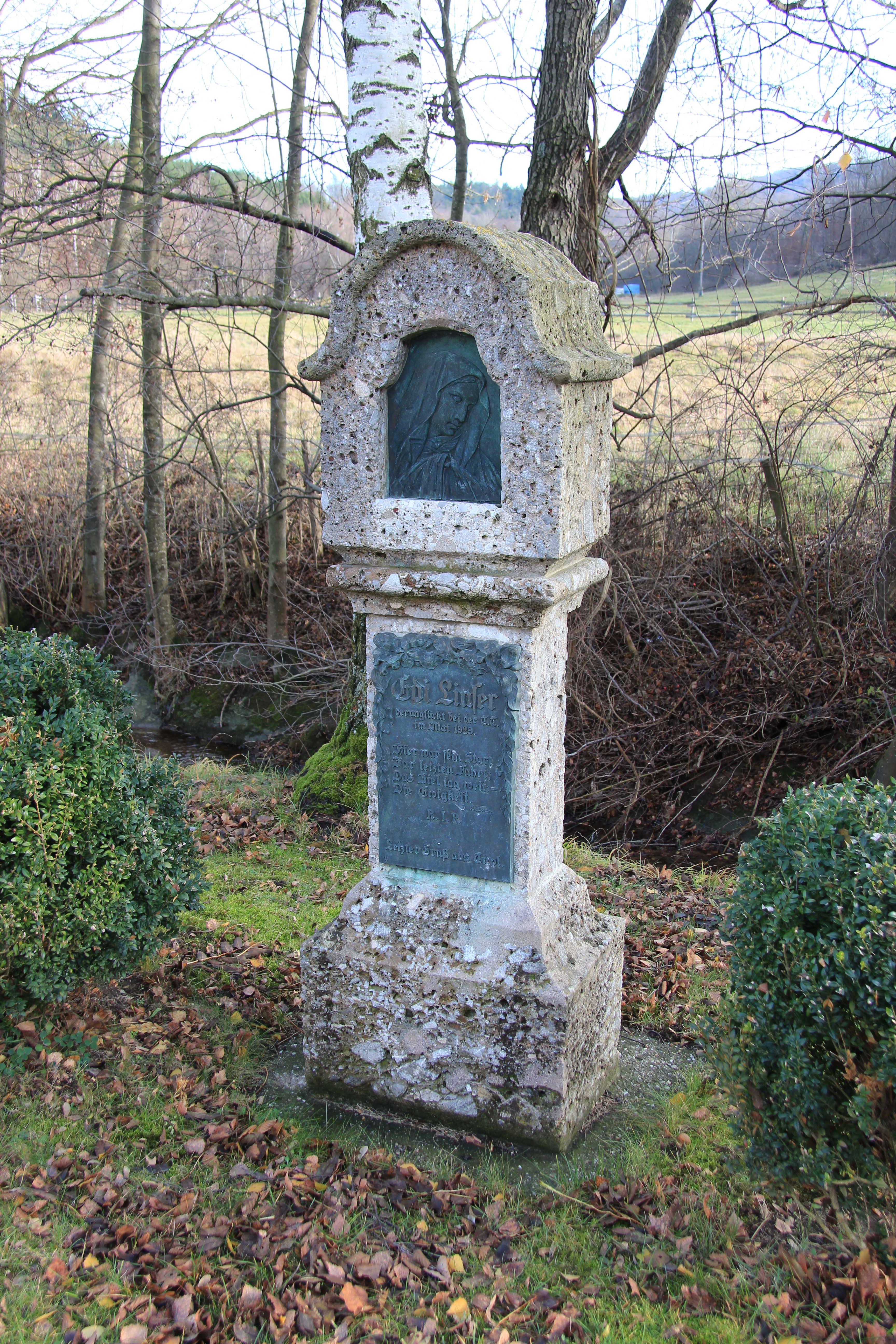 Denkmal an den Rennfahrer Edi Linser in Wolfsgraben